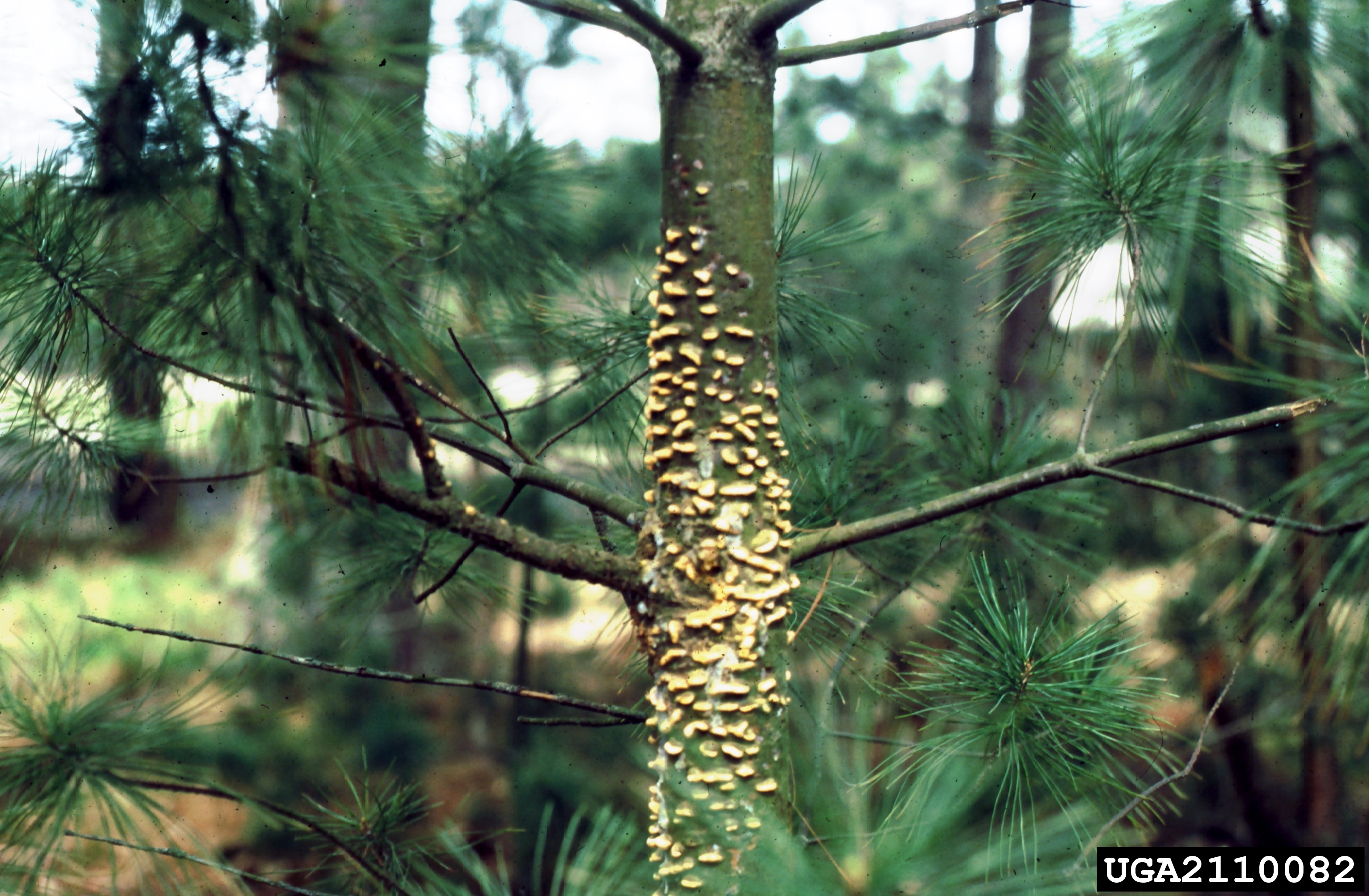 Cronartium_ribicola at Pinus strobus